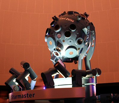 Modèle Zeiss Skymaster